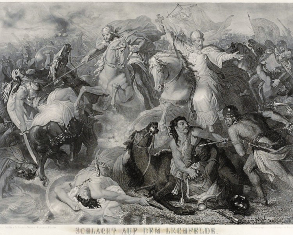 Schlacht auf dem Lechfeld am 10. August 955 Galvanographie von Leo Schöninger nach einem Fresko aus 1846 von Julius Frank.